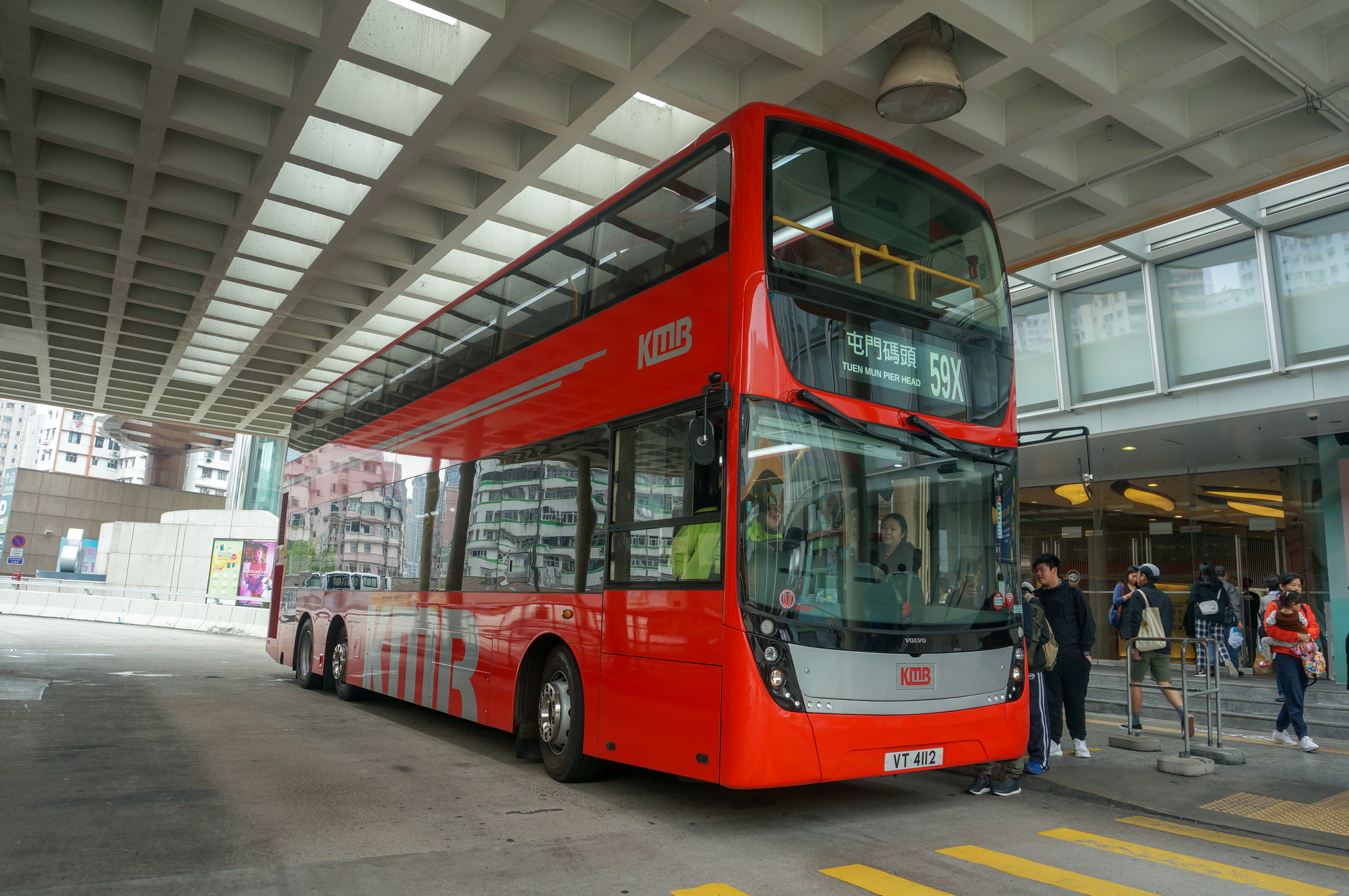 此線用車AVG3（紅巴2.0）正停泊旺角東站公共運輸交匯處待發。